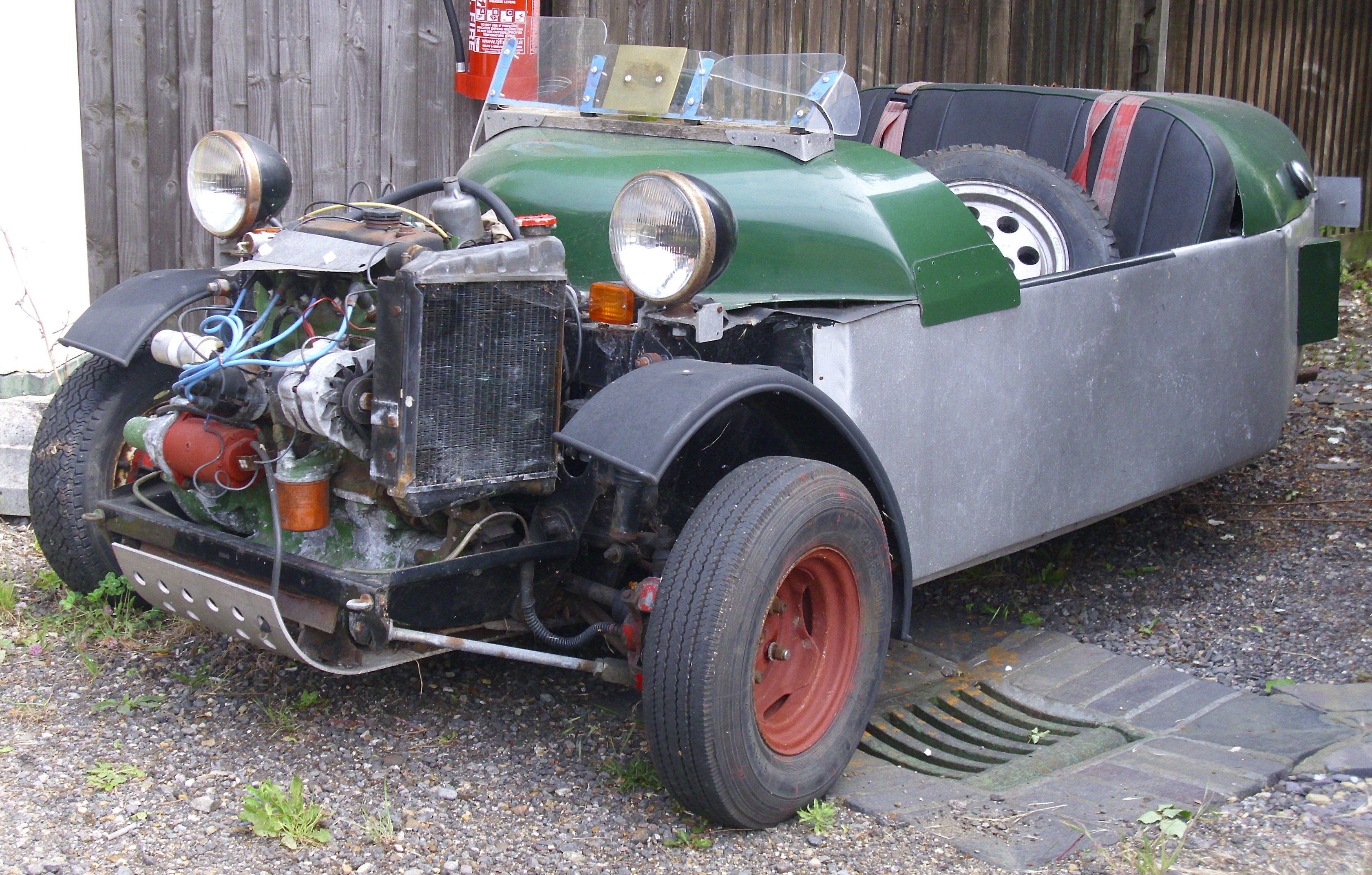 Skip